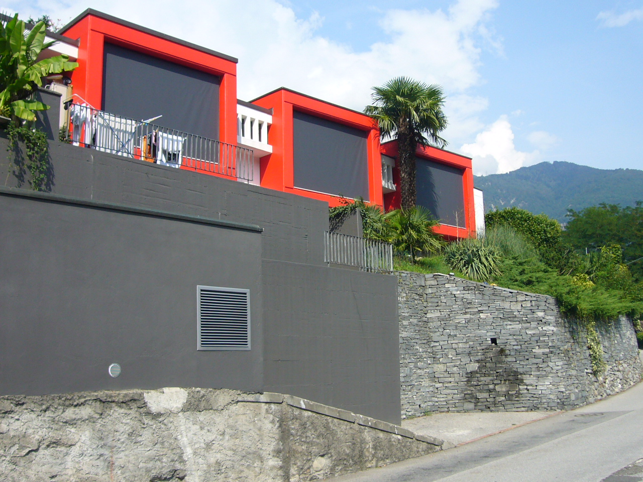 Casa Rosso